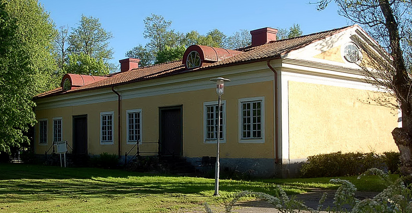 Laxå Museum, västra flygelbyggnaden till Laxå Herrgård uppförd på 1819.